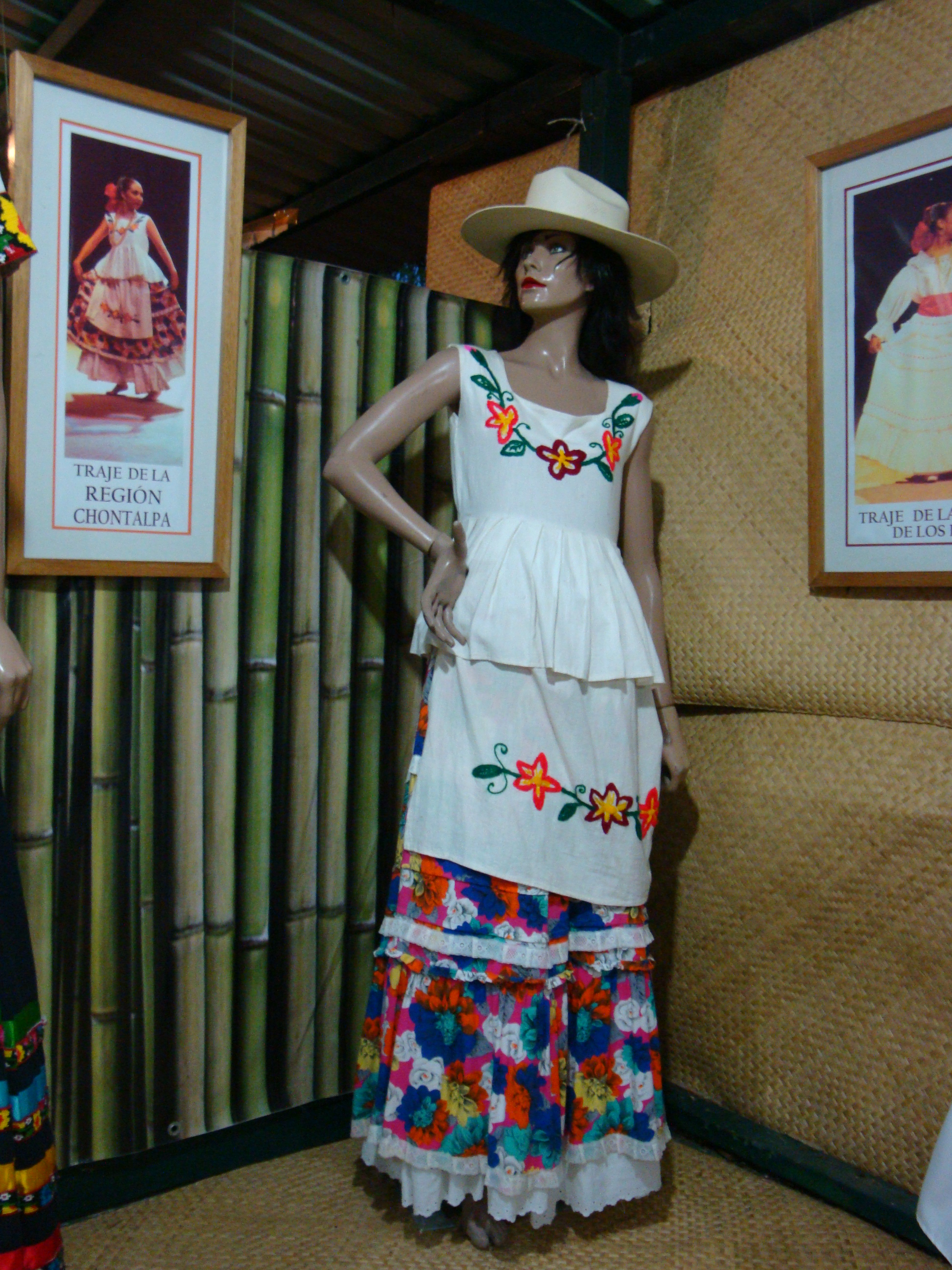 Traje tradicional de la región de la Chontalpa, estado de Tabasco, México. Datos proporcionados por los Mtros. Juan Torres Calcaneo y Elvira Vargas de Manzanilla de la Compañía de Danza Folklórica de la ciudad de Villahermosa.